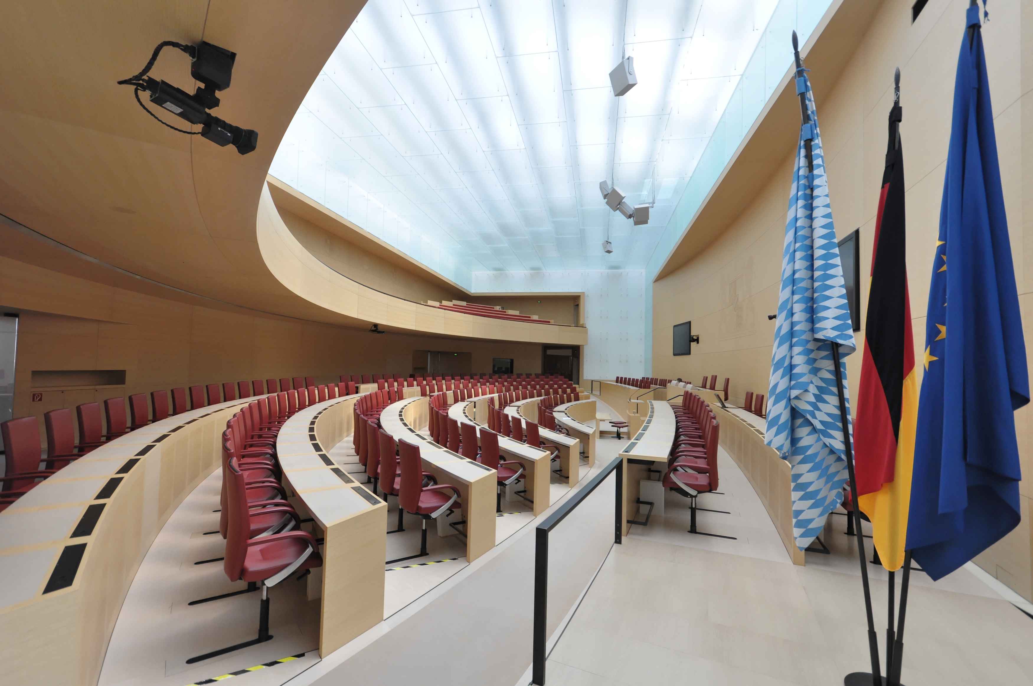 Landtagsprojekt-Bayern im Plenarsaal